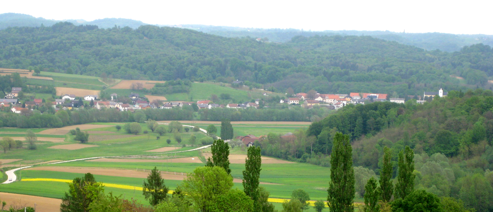 Rogašovci, village in Slovenia